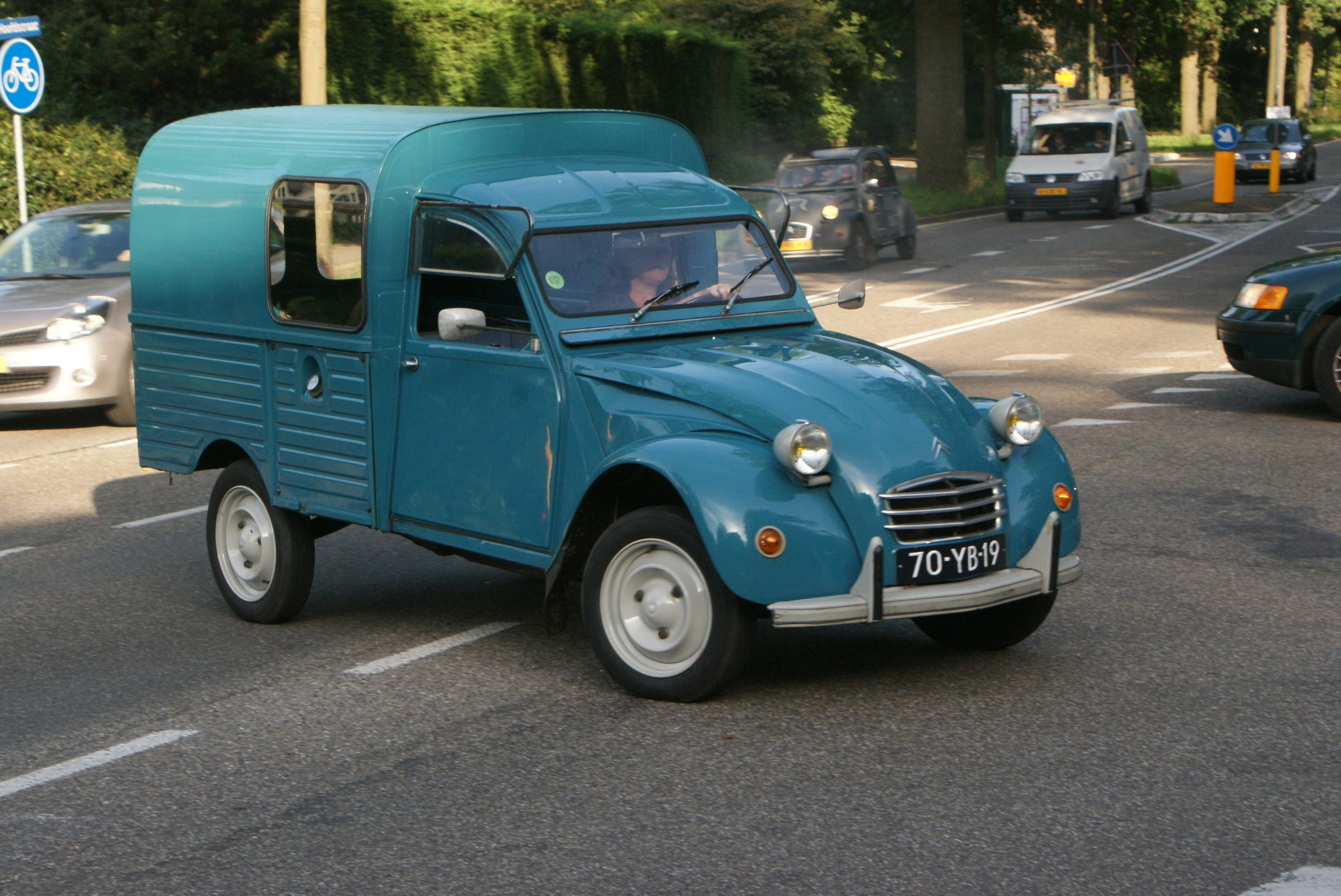 70-YB-19